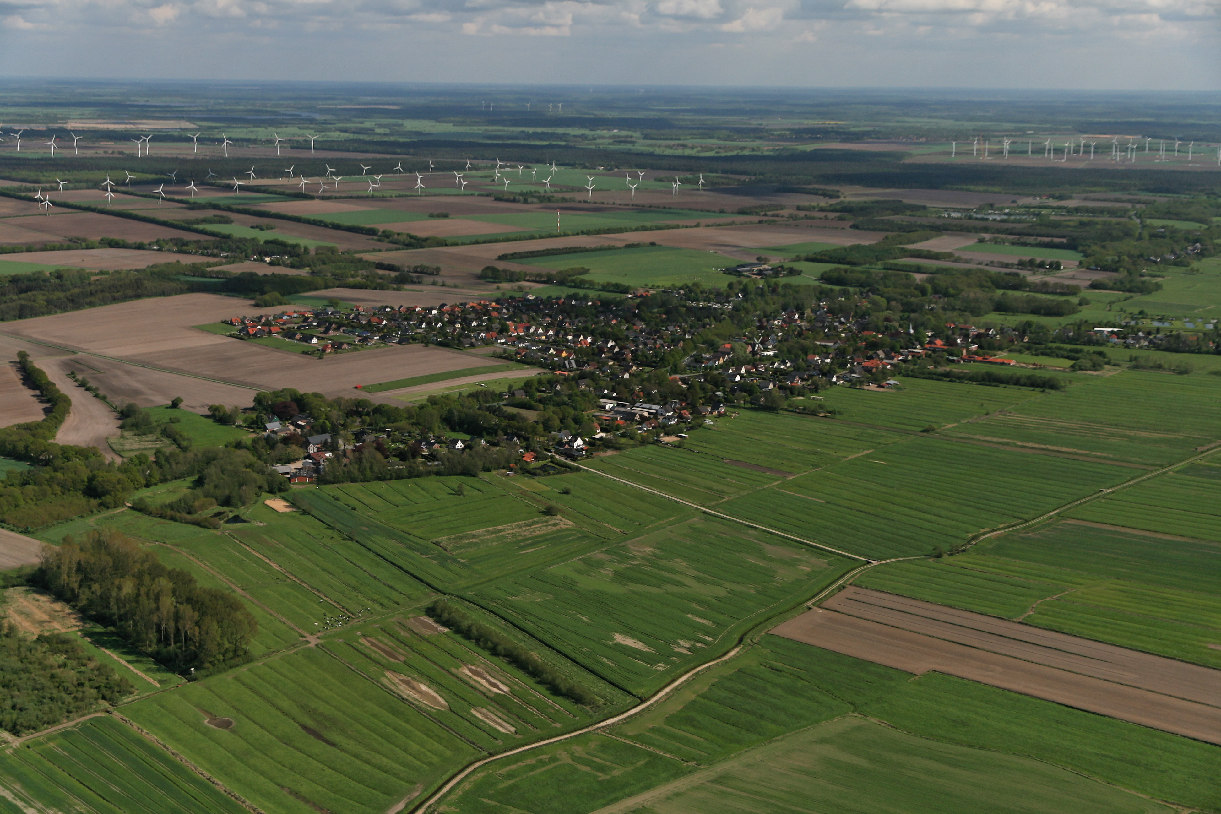 Midlum von Nordwesten gesehen.